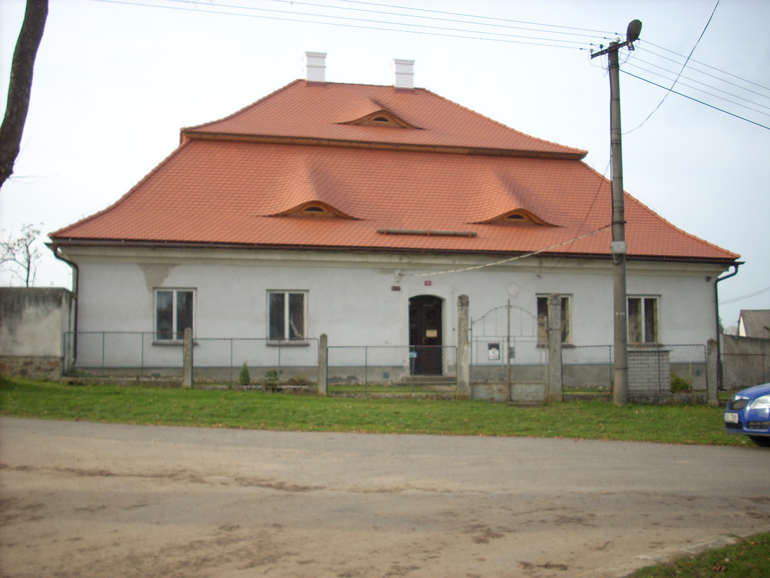 Nížkov, fara